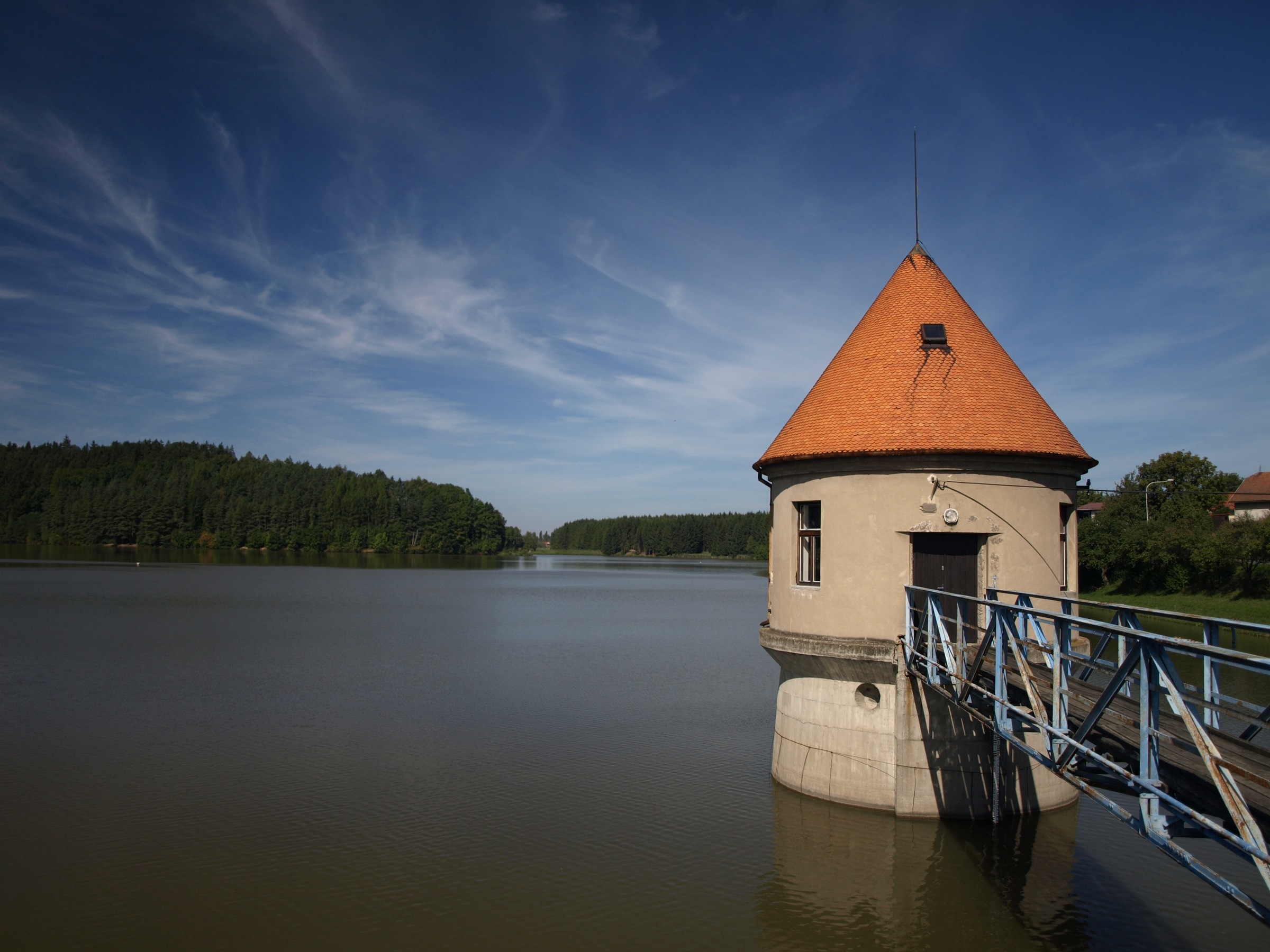 Přehrada Fryšták (Fryšták), Fryšták 117